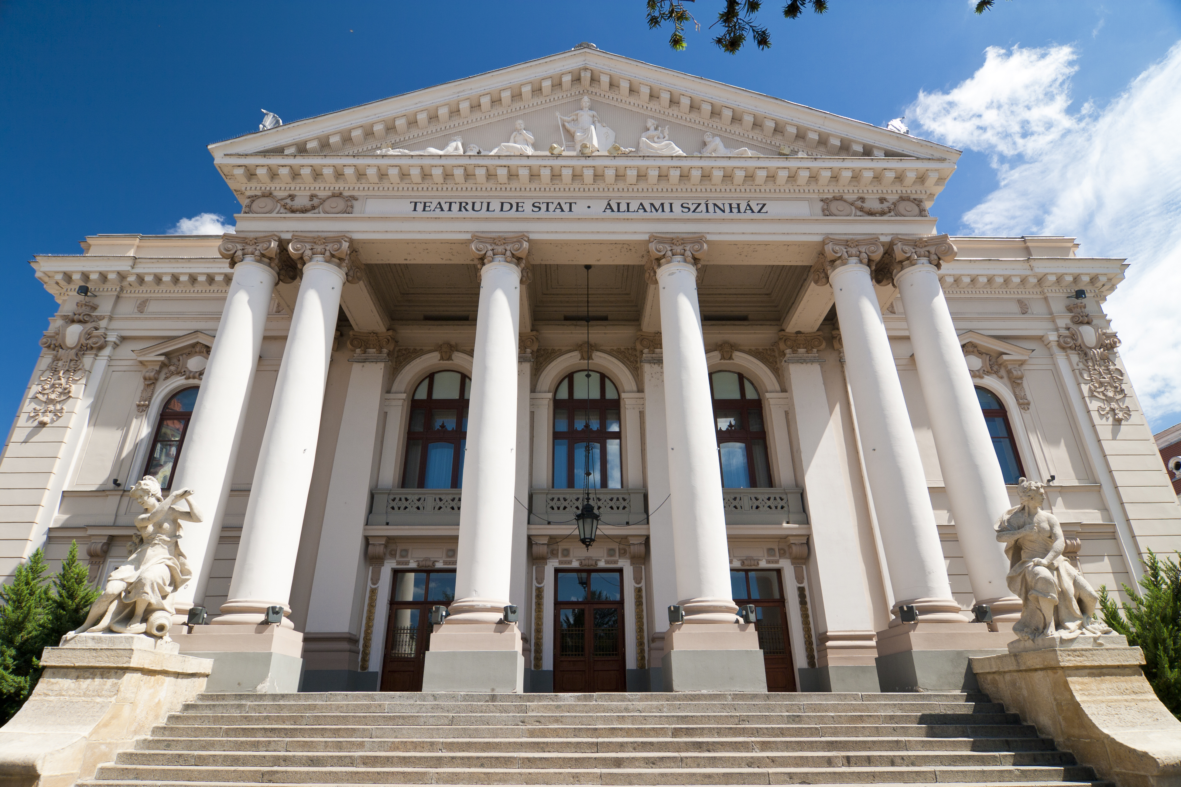 Teatrul de Stat Oradea